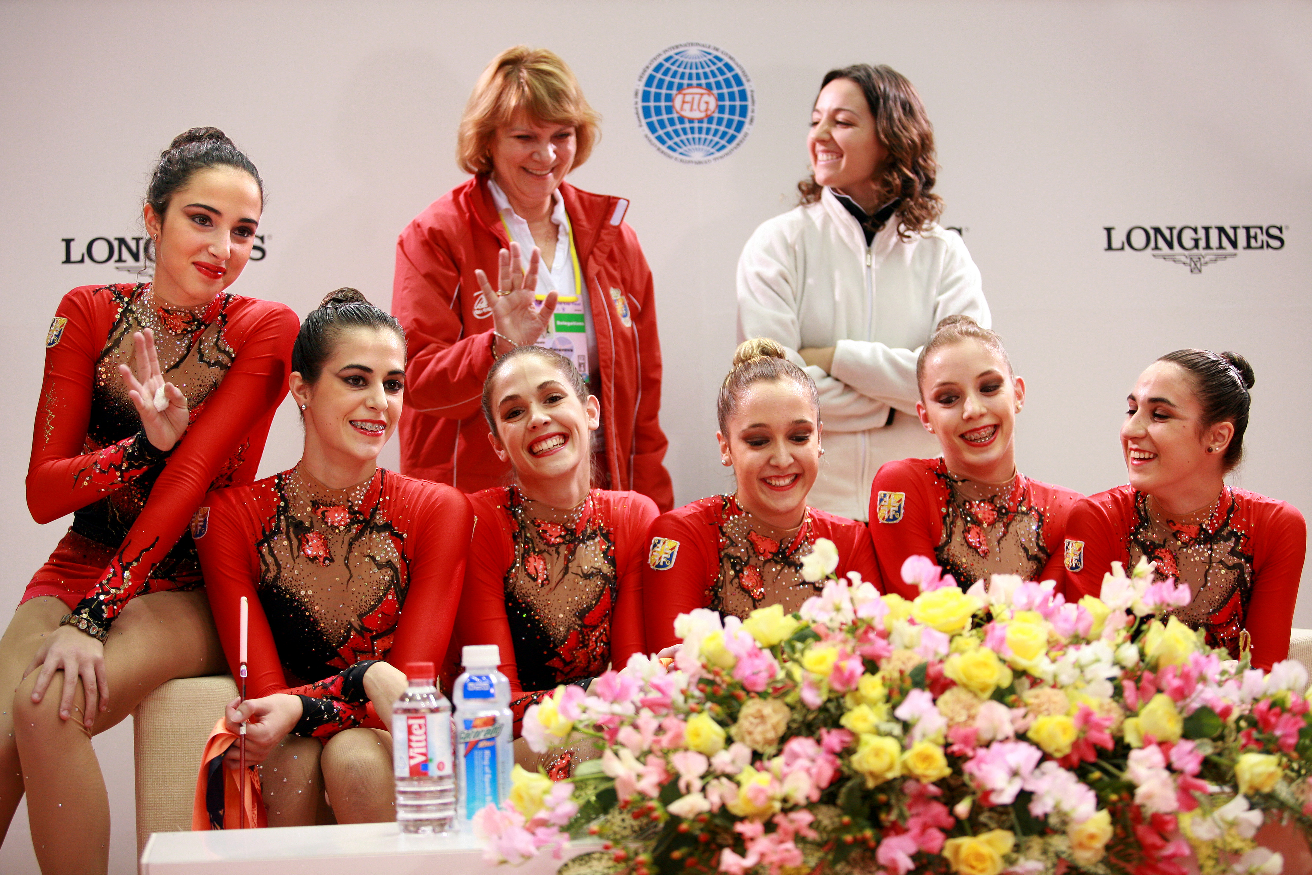 El conjunto español junto con la seleccionadora Anna Baranova y la entrenadora Sara Bayón en la Final de la Copa del Mundo de 2006 en Mie. Las gimnastas son, de izquierda a derecha: Violeta González, Lara González, Bárbara González, Isabel Pagán, Ana María Pelaz y Nuria Velasco.